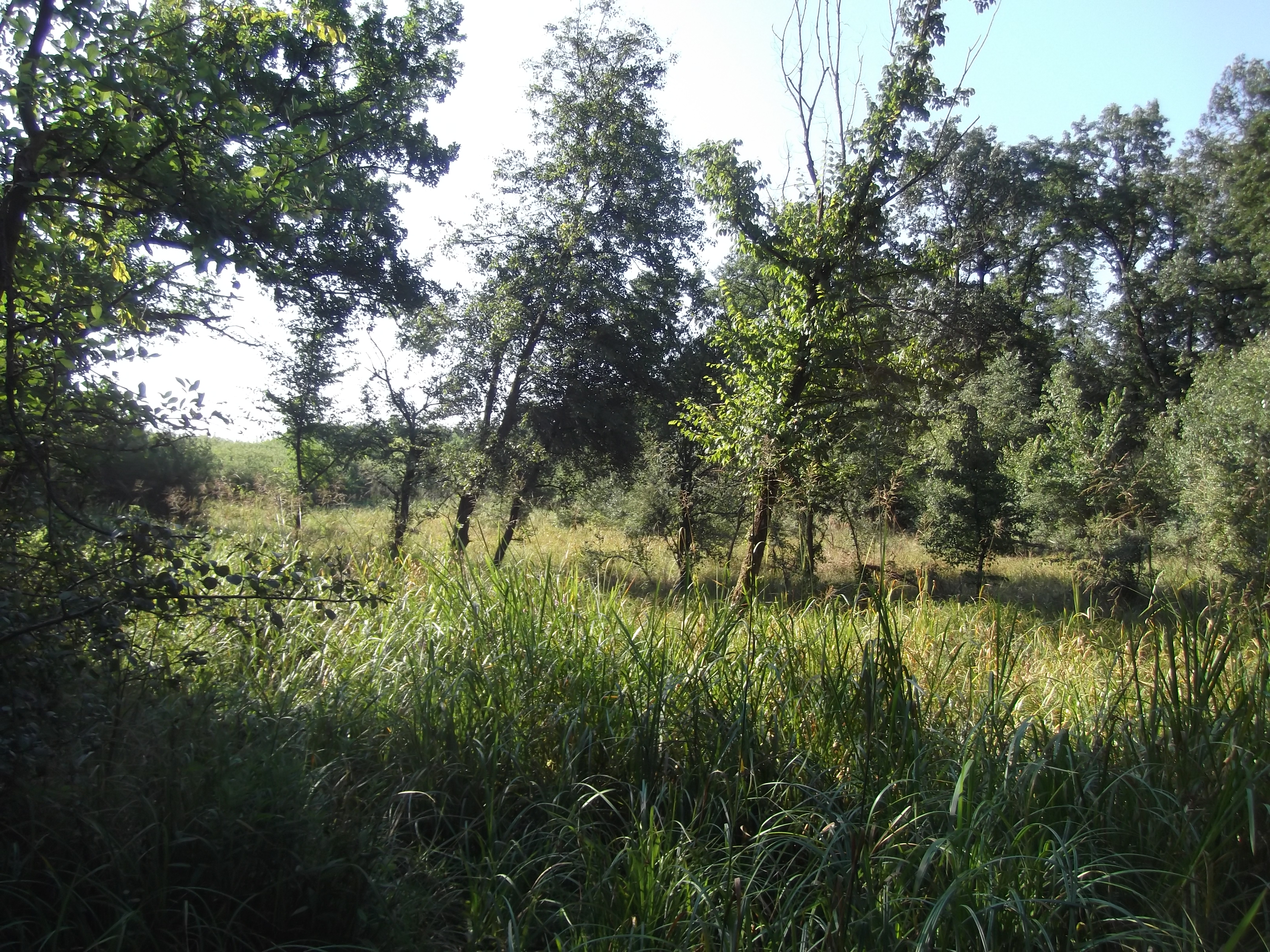 A Kozara vadkörtefái a Felső-Dunamellék Természetvédelmi Rezervátumban (Bezdán, Szerbia)